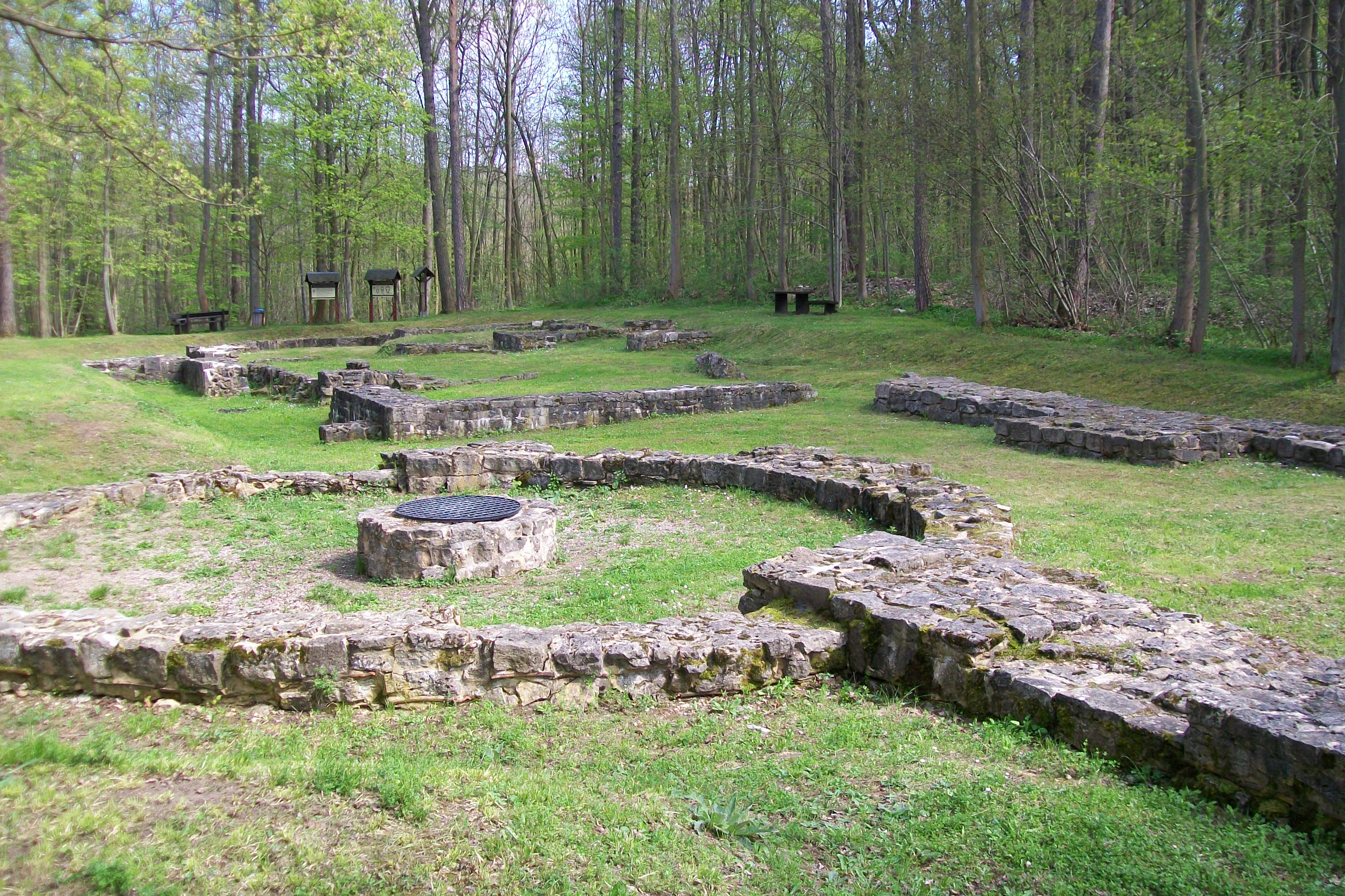 Ehemaliges Benediktinerinnenabtei Walpurgiskloster in Arnstadt.